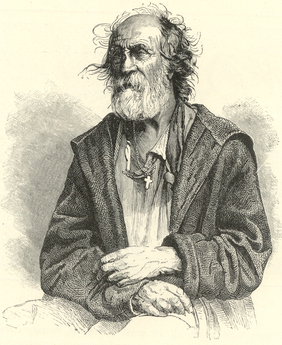 'PORTRAIT OF A KIEV PILGRIM'. 'Nouvelle Geographie Universelle La Terre et les Hommes V : L' Europe Scandinave, Russe etc.' by Jacques Elisee Reclus, published in Paris by Hachette & Cie., 1880